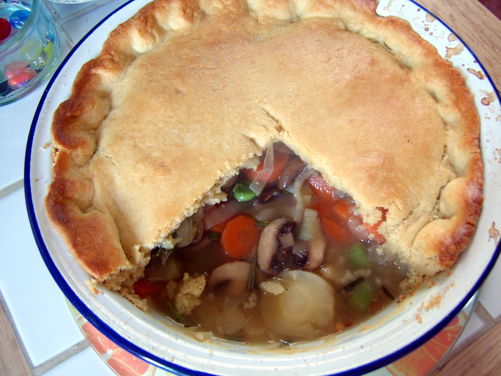 Woolton pie